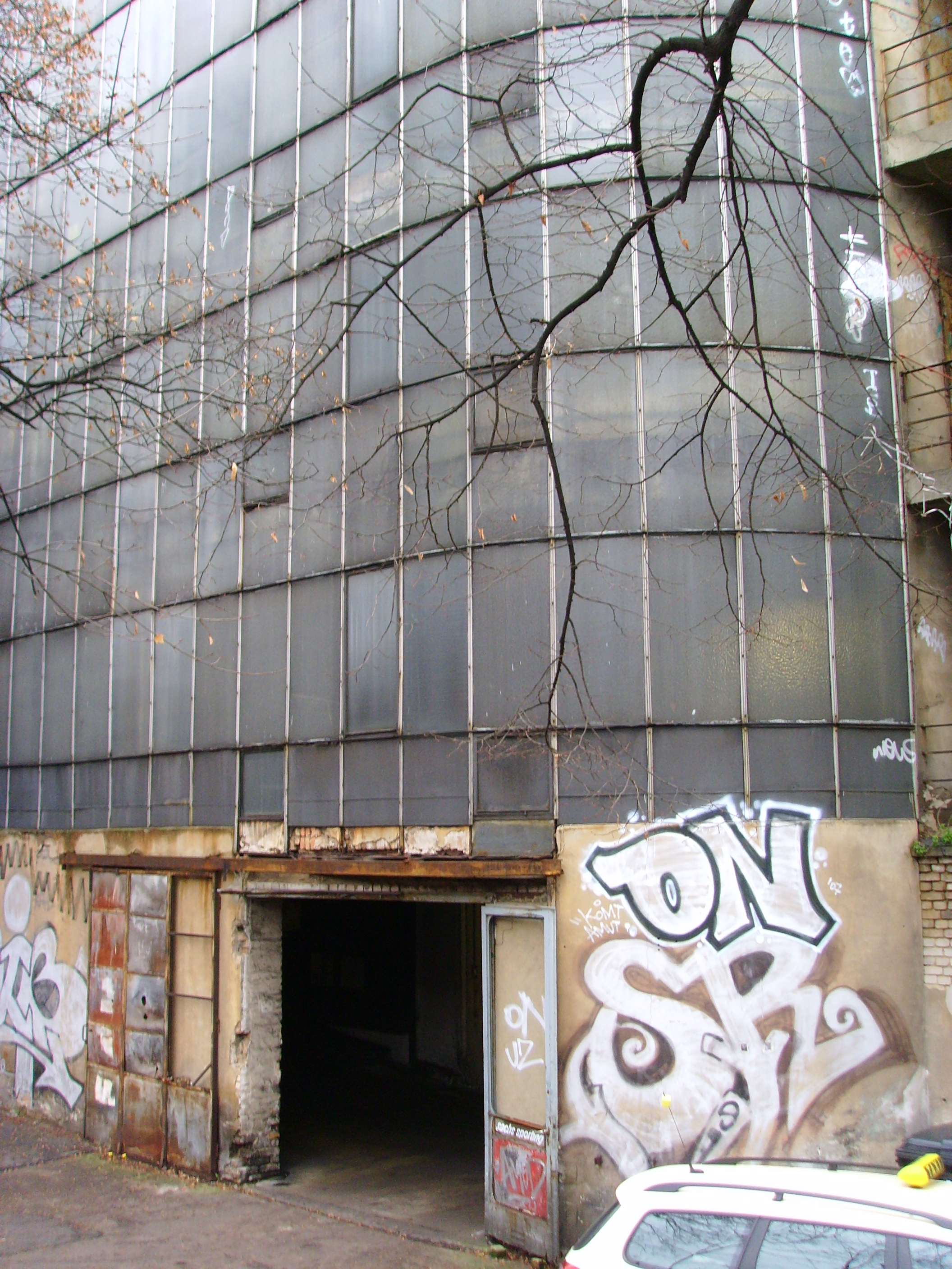 Kant-Garage, Berlin, Kantstraße 126-127